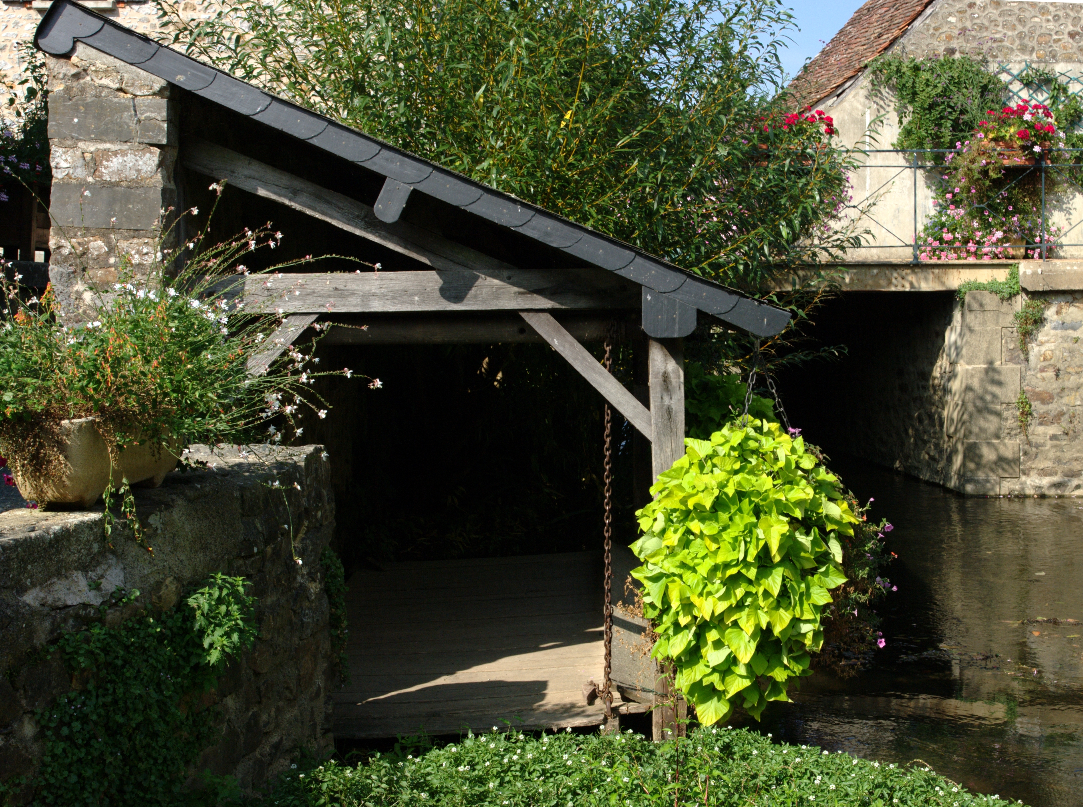 Lavoir à St jean-sur-Erve, Mayenne.